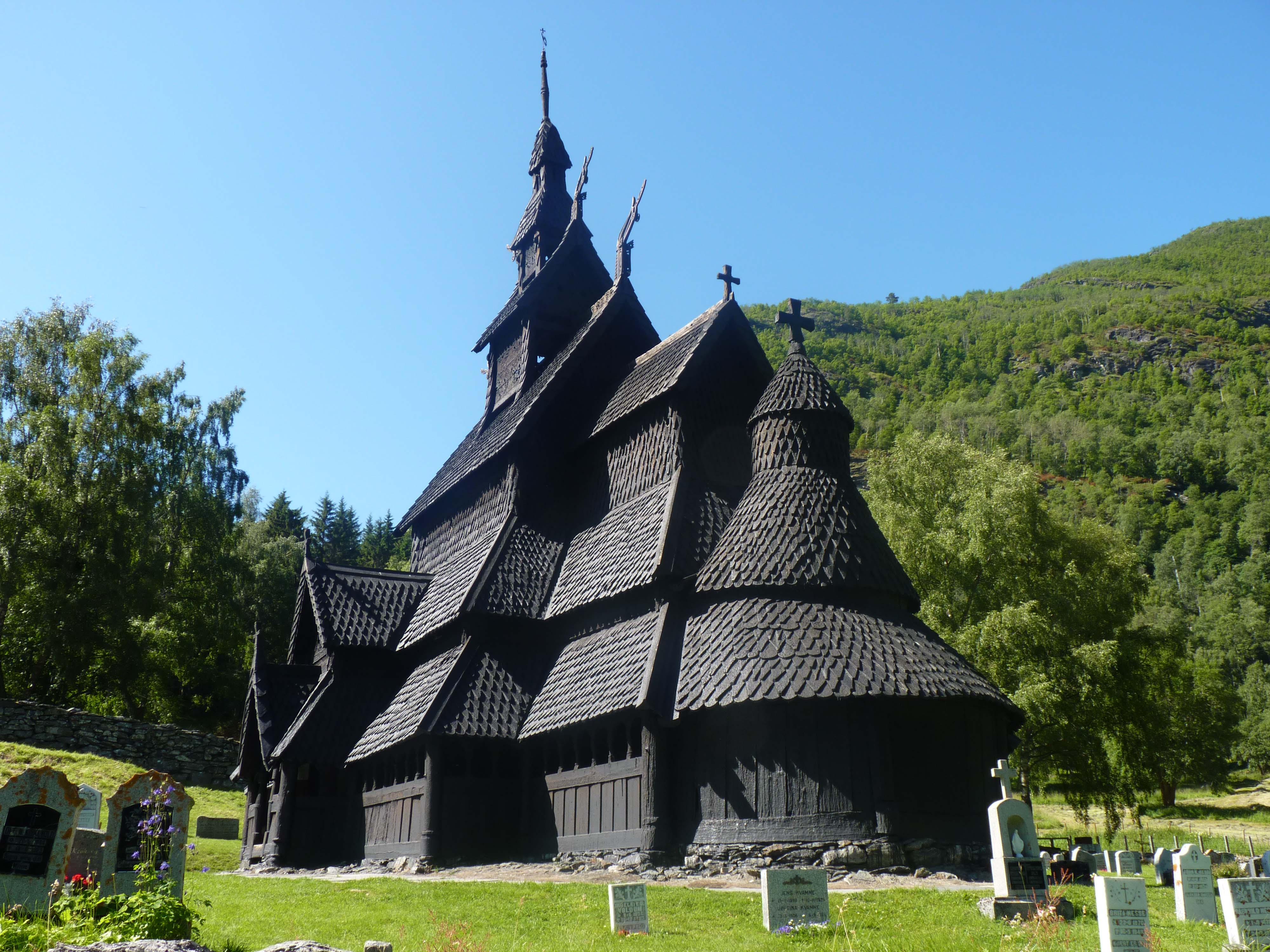 Borgund stavkirke